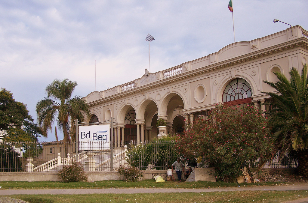 Hospital italiano Rey Humberto I, en Montevideo.